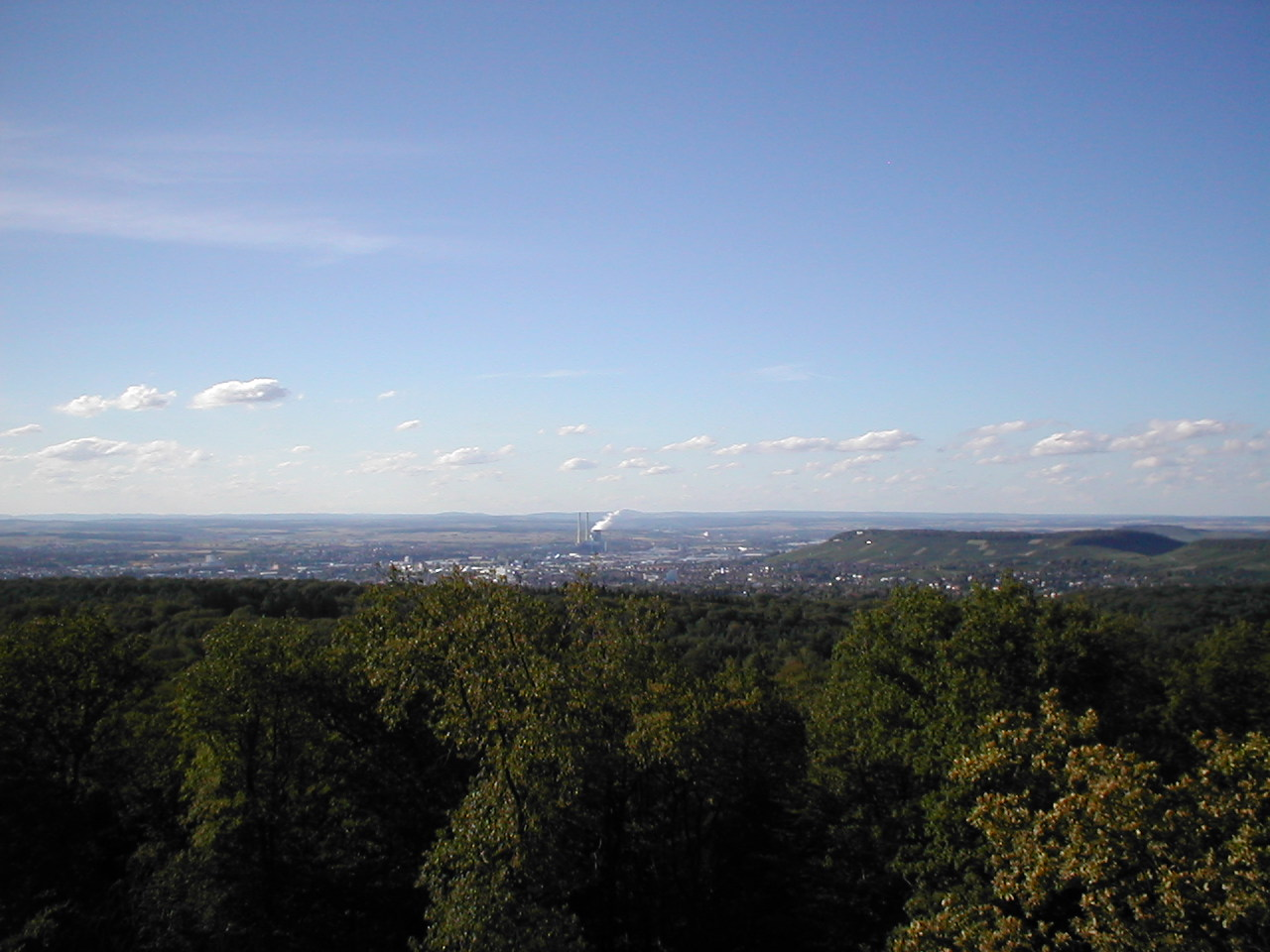 Blick vom Schweinsbergturm (367 m ü. NN) über Heilbronn